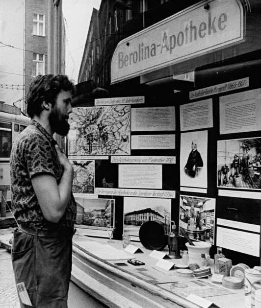 Berlin, Berolina Apotheke, Schaukasten ADN-ZB Senft 7.9.82 Berlin: 250 Jahre Berolina-Apotheke - Zum Jubiläum der historischen Apotheke in der Rosenthaler Straße wurde eigens ein Schaufenster mit Dokumenten gestaltet, die belegen, daß der Preußenkönig Friedrich Wilhelm I. am 7. September 1732 seinem Leibmedikus die Erlaubnis erteilte, eine "Medicin-Apotheque" einrichten zu dürfen. Ihr erstes Domizil hatte die Einrichtung in der Kochstraße. 1758 bezog die Apotheke ihren heutigen Standort nahe dem Hackeschen Markt. - siehe auch 1982-0907-031N